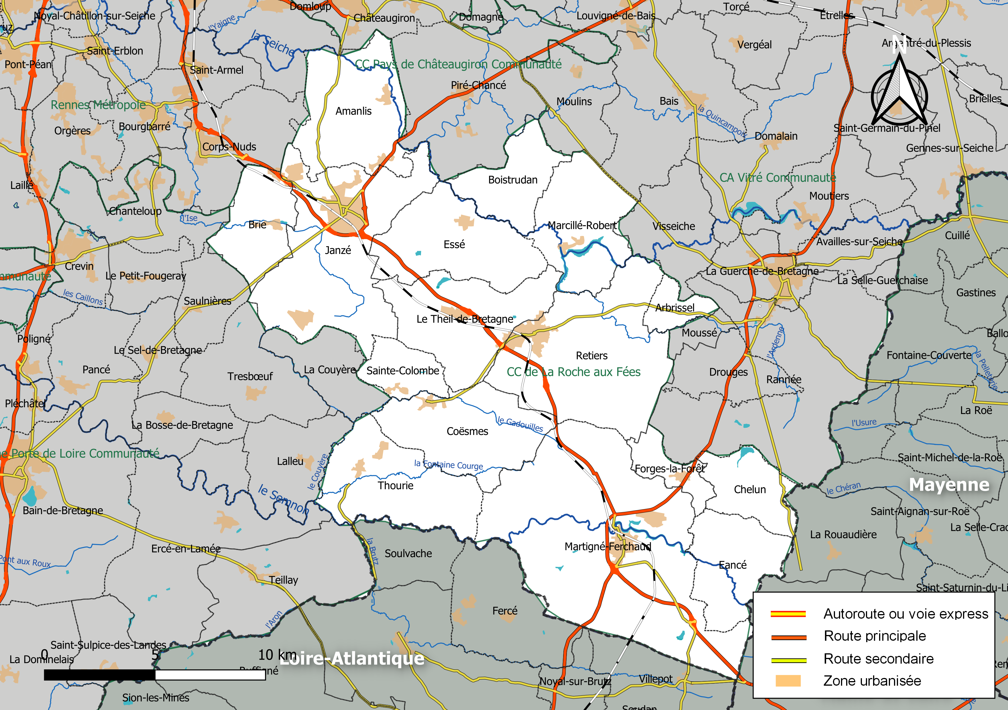 Carte géographique de la Communauté de communes de la Roche-aux-Fées, département d'Ille-et-Vilaine, France. Composition au 1er janvier 2019.